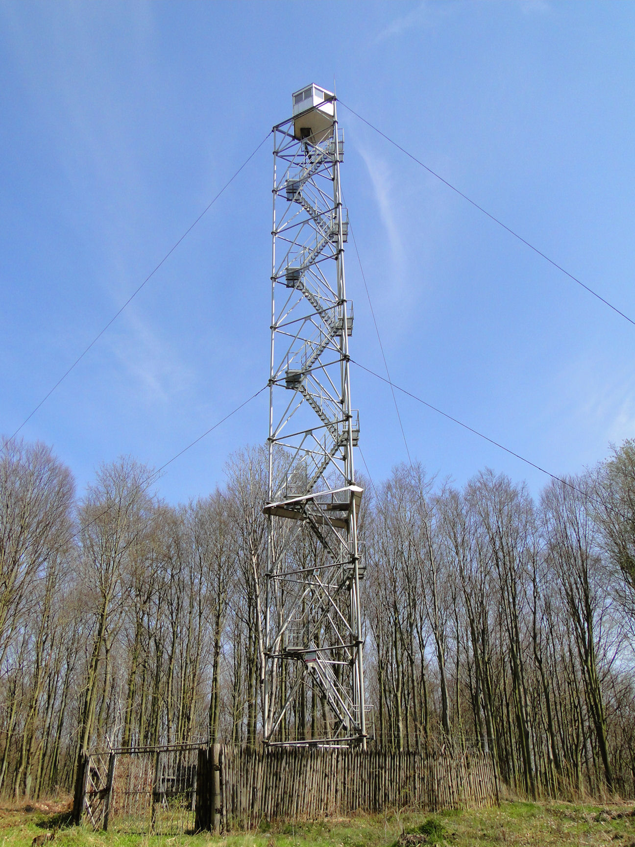 Wieża obserwacyjna ppoż. na Bukowcu w Puszczy Bukowej pod Szczecinem